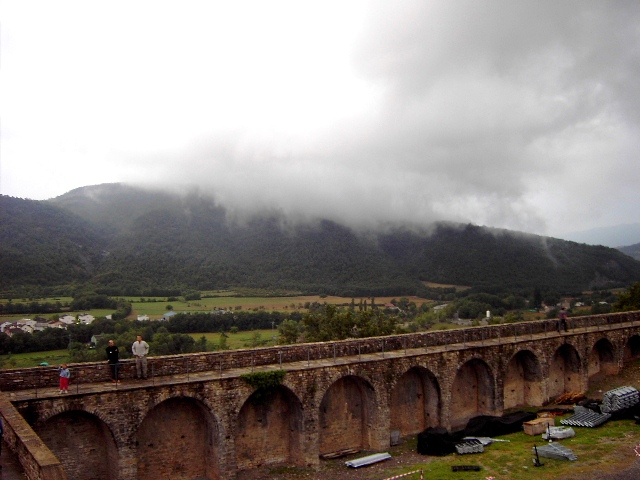 Muralla sur del Castillo de Aínsa, vista desde dentro del recinto. Aragonés: Muralla sur d'o Castiello de l'Aínsa, enviesta dende á dintro d'o recinto estando.